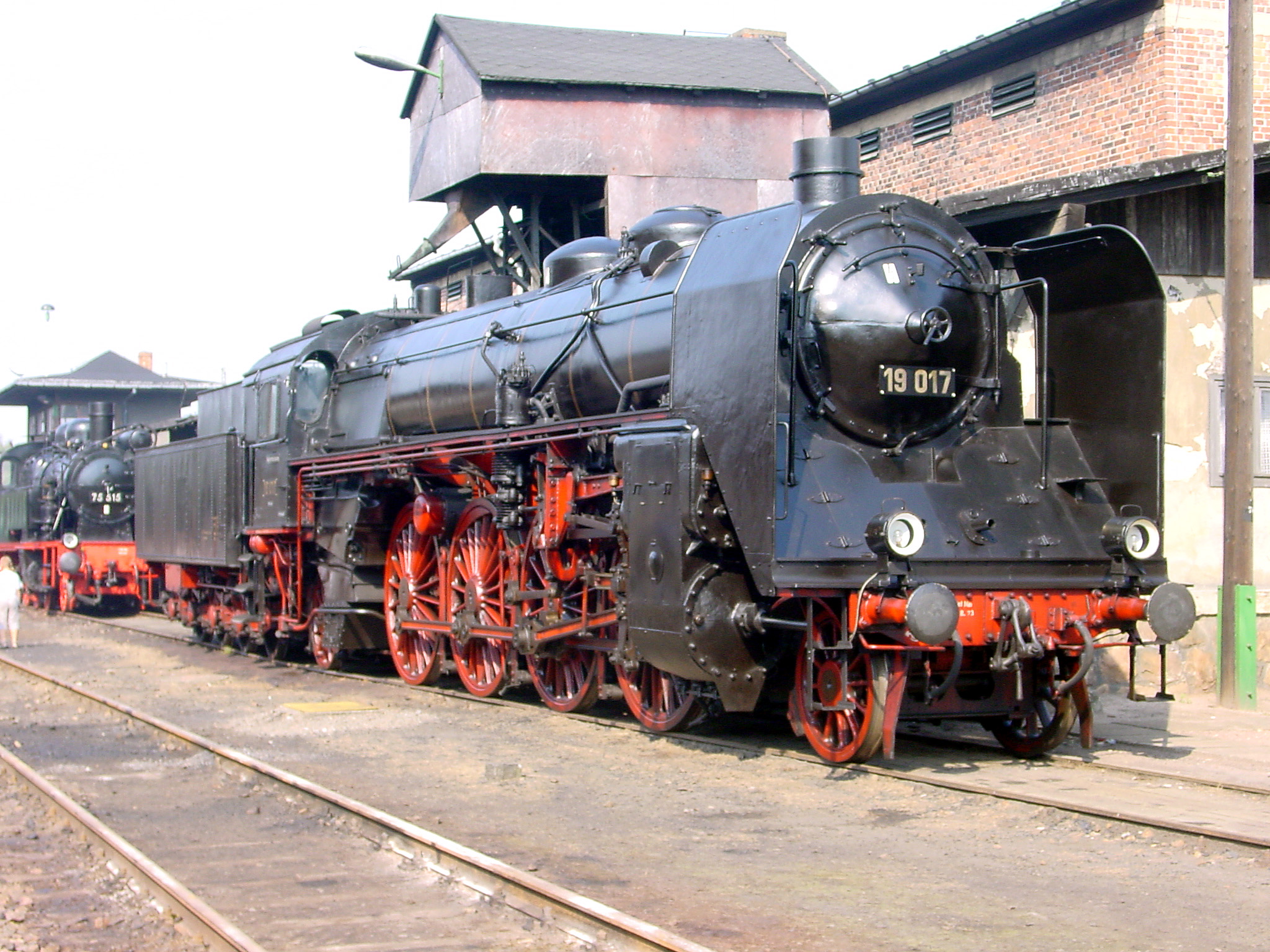 Dampflokomotive Sächsische XX HV im Eisenbahnmuseum Chemnitz-Hilbersdorf.